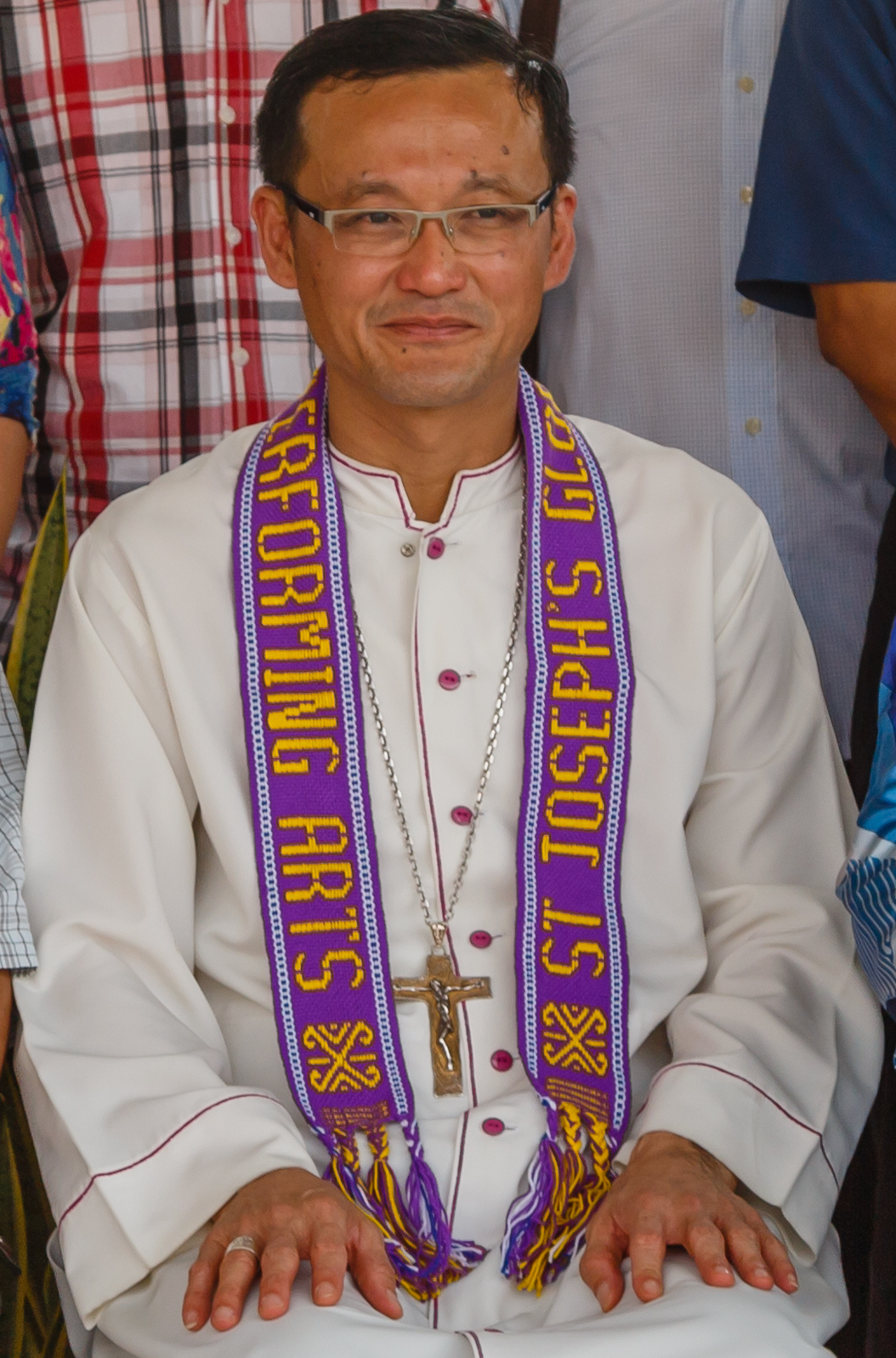 Uskup Agung Kota Kinabalu, John Wong Soo Kau